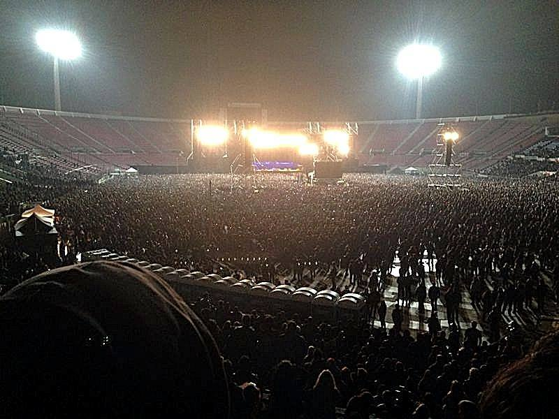 chile 2013